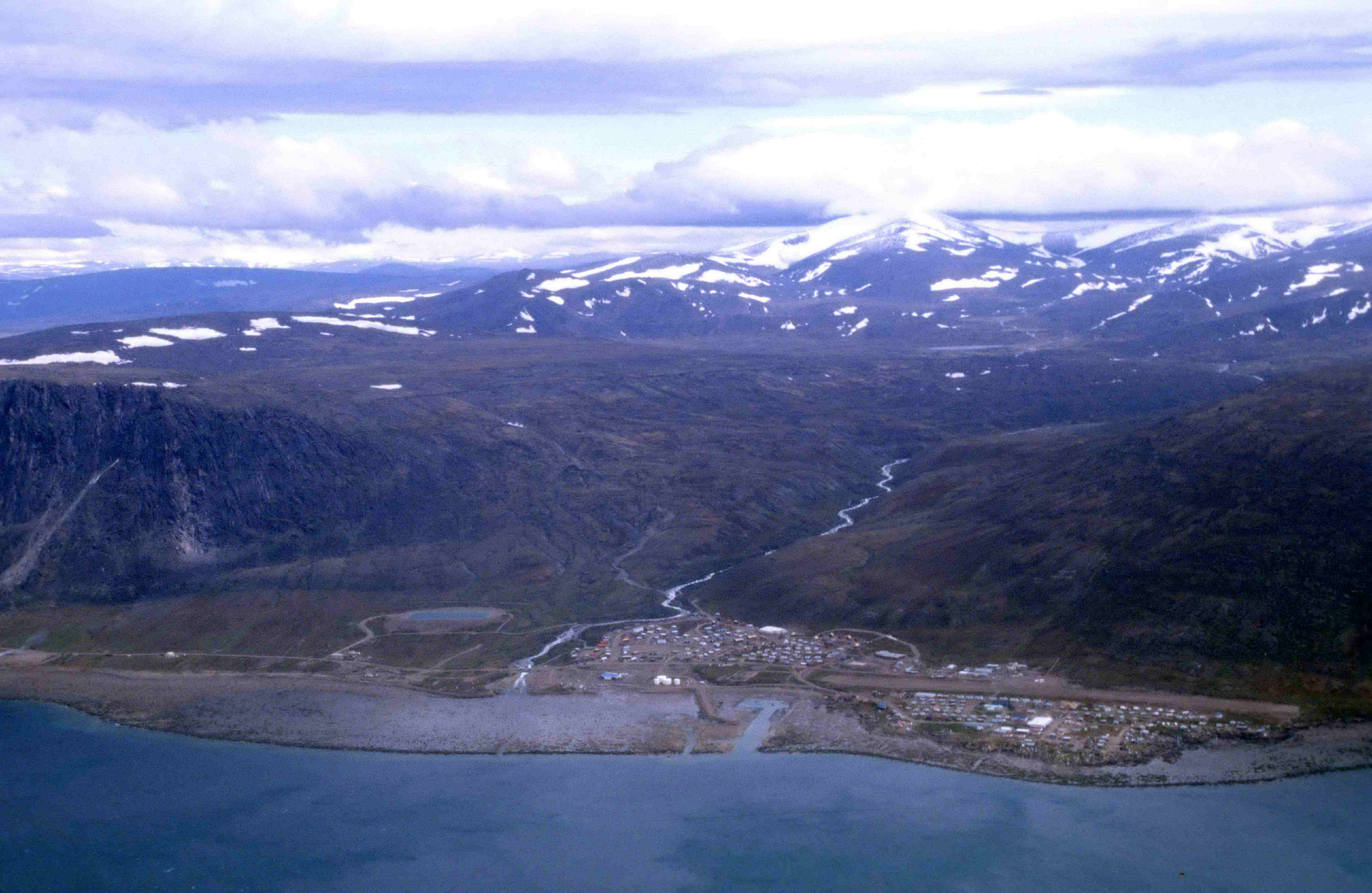 Pangnirtung (Pannituq) on Cumberland Peninsula (Baffin Island, Nunavut, Canada)